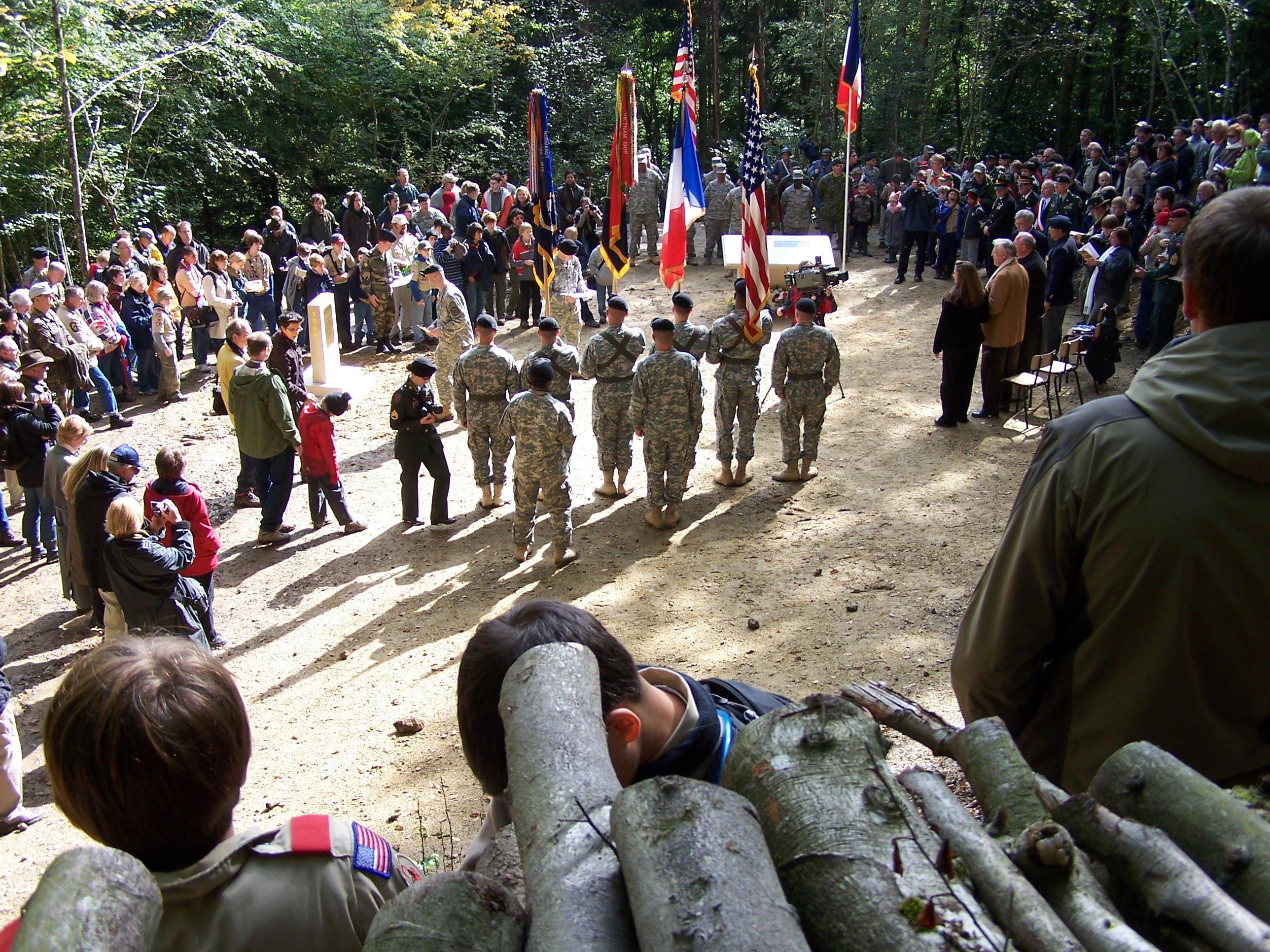 Einweihung des Denkmals für Sgt. York am 4. Oktober 2008 bei Chatel-Chéhéry